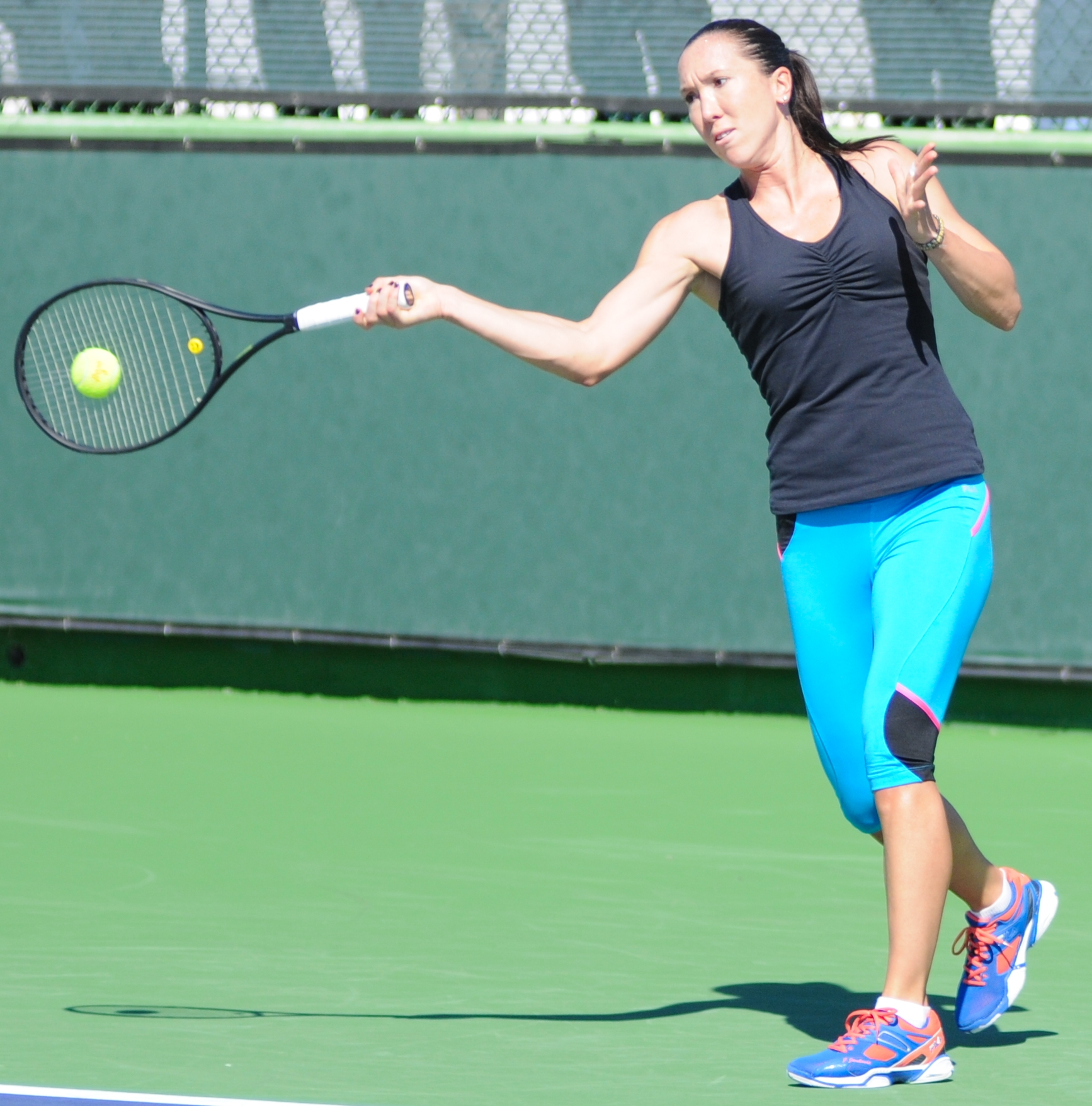 BNP Paribas Open 2013